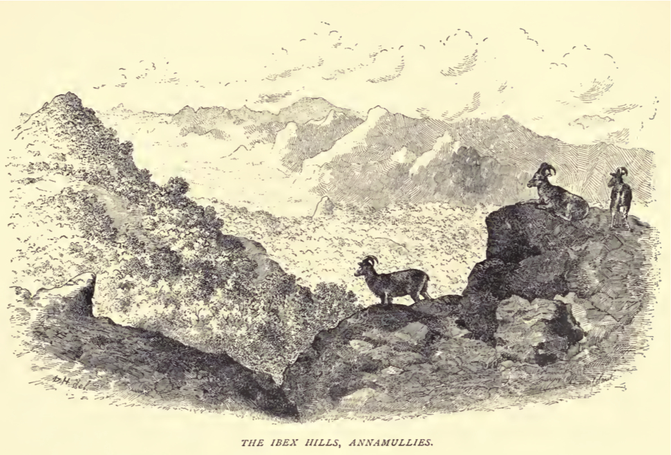 Douglas Hamilton, Niligiri Tahr, Annaimalai